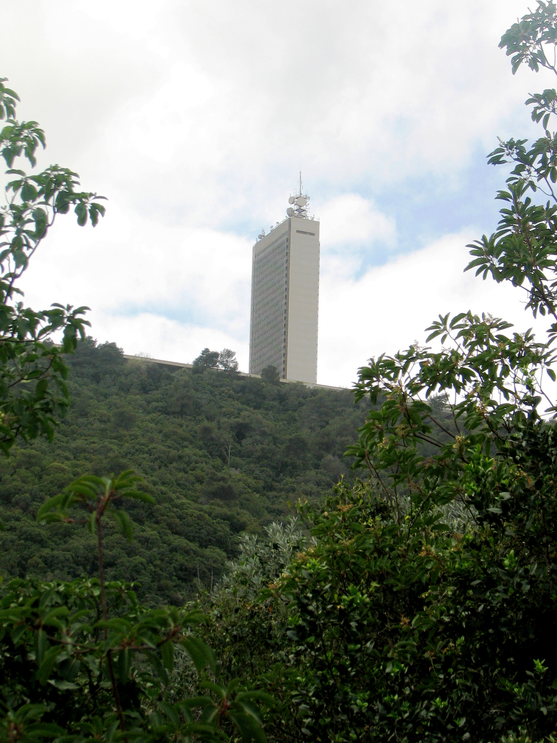 Park Nesher in the city Nesher on Mount Carmel, Israel. In the park there are 2 Suspension bridges, walking paths, Mediterranean forests, woodlands, scrub and flowers. A place for picnic, and playground. פארק נשר בעיר נשר ליד חיפה. הפארק שוכן בהר הכרמל. בפארק שני גשרים תלויים, חורש ים תיכוני, שפע פרחים, וחיות בר. בפארק אזור המיועד לפיקניק שולחנות וספסלים וכן מגרש משחקים לילדים. בואדי קטיע העובר בפארק מסלולי הליכה מסומנים העוברים בואדי ועל מורדותיו. ומערה פרהיסטורית. בפארק גם דרך העוברת על צלע ההר ישירות לגשרים, בה ניתן ללכת גם עם עגלות ילדים וכן ספסלי ישיבה ומרפסות תצפית. מהואדי ניתן לראות תצפיות על אוניברסיטת חיפה ועל שכונותיה של העיר נשר מגדל אוניברסיטת חיפה